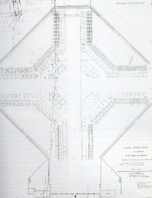 Plànol del Cementiri Vell de Sabadell